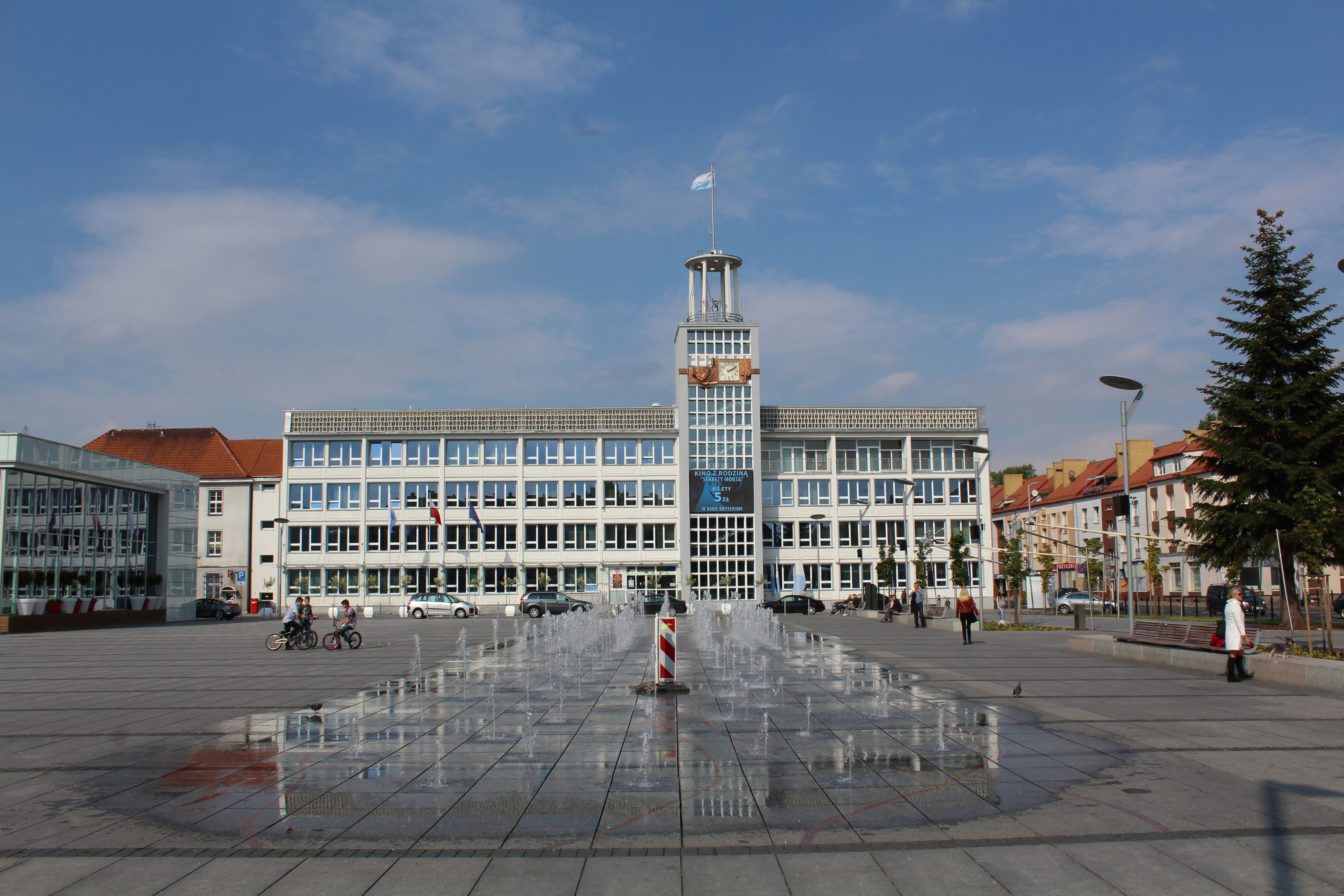 Ratusz miasta Koszalin w 2015 roku